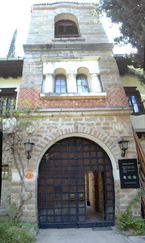 мъглижкия манастир